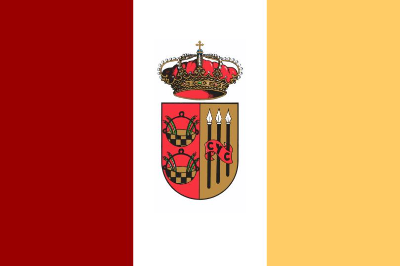 Bandera del municipio de Cenicientos (Madrid, España)